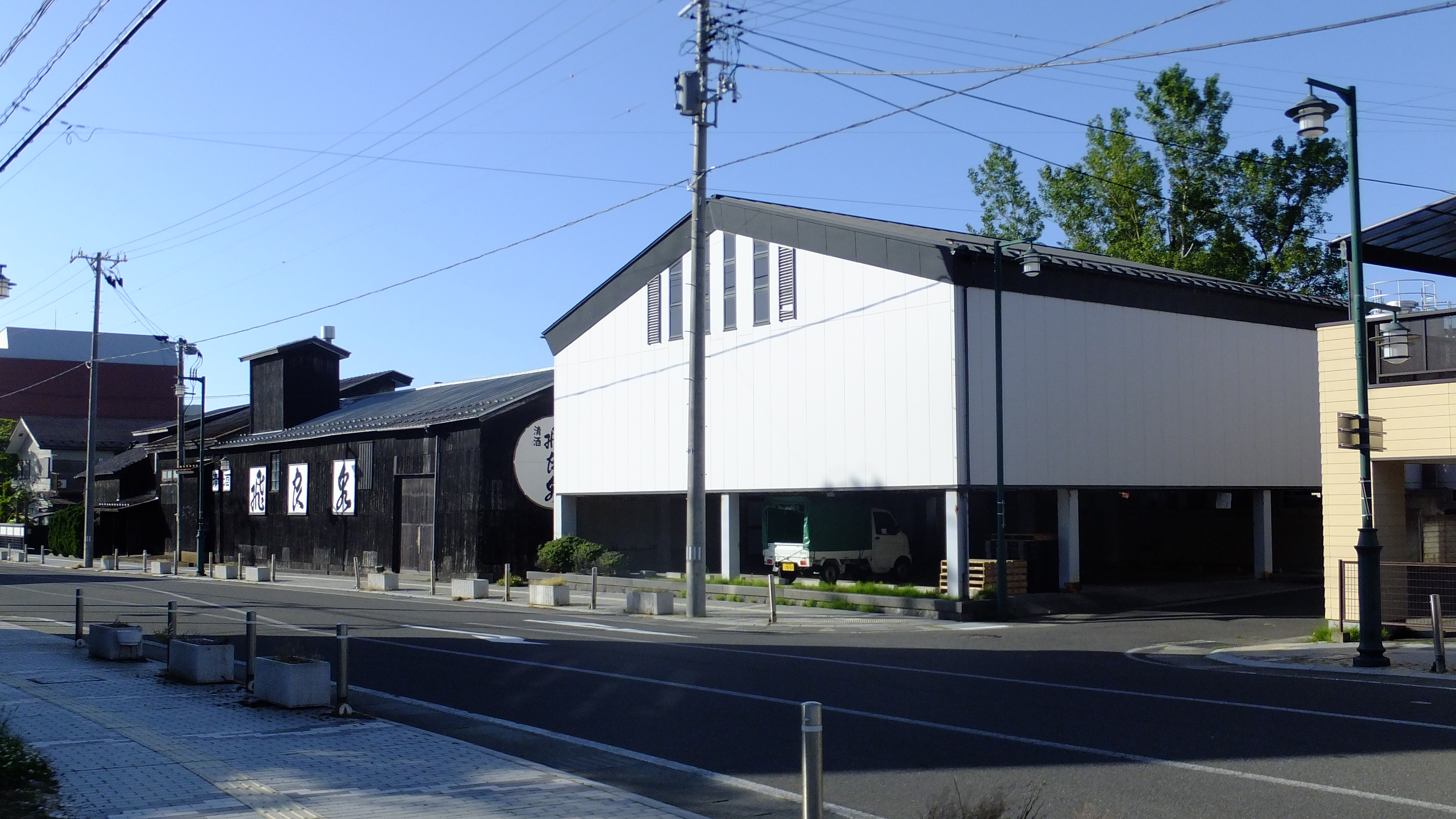 飛良泉本舗（秋田県にかほ市）